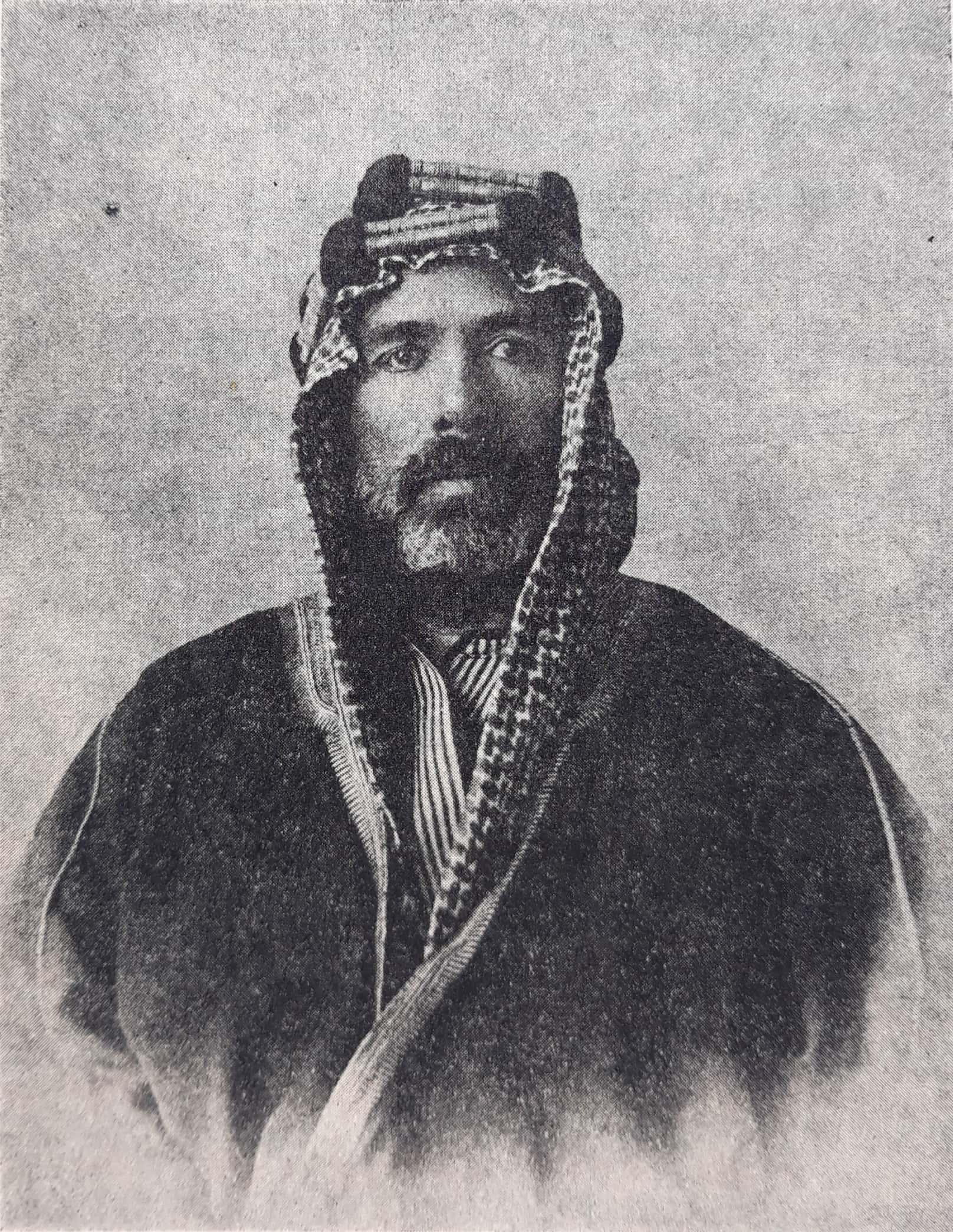 خالد الحكيم (أيضا خالد الحكيم ، (ب